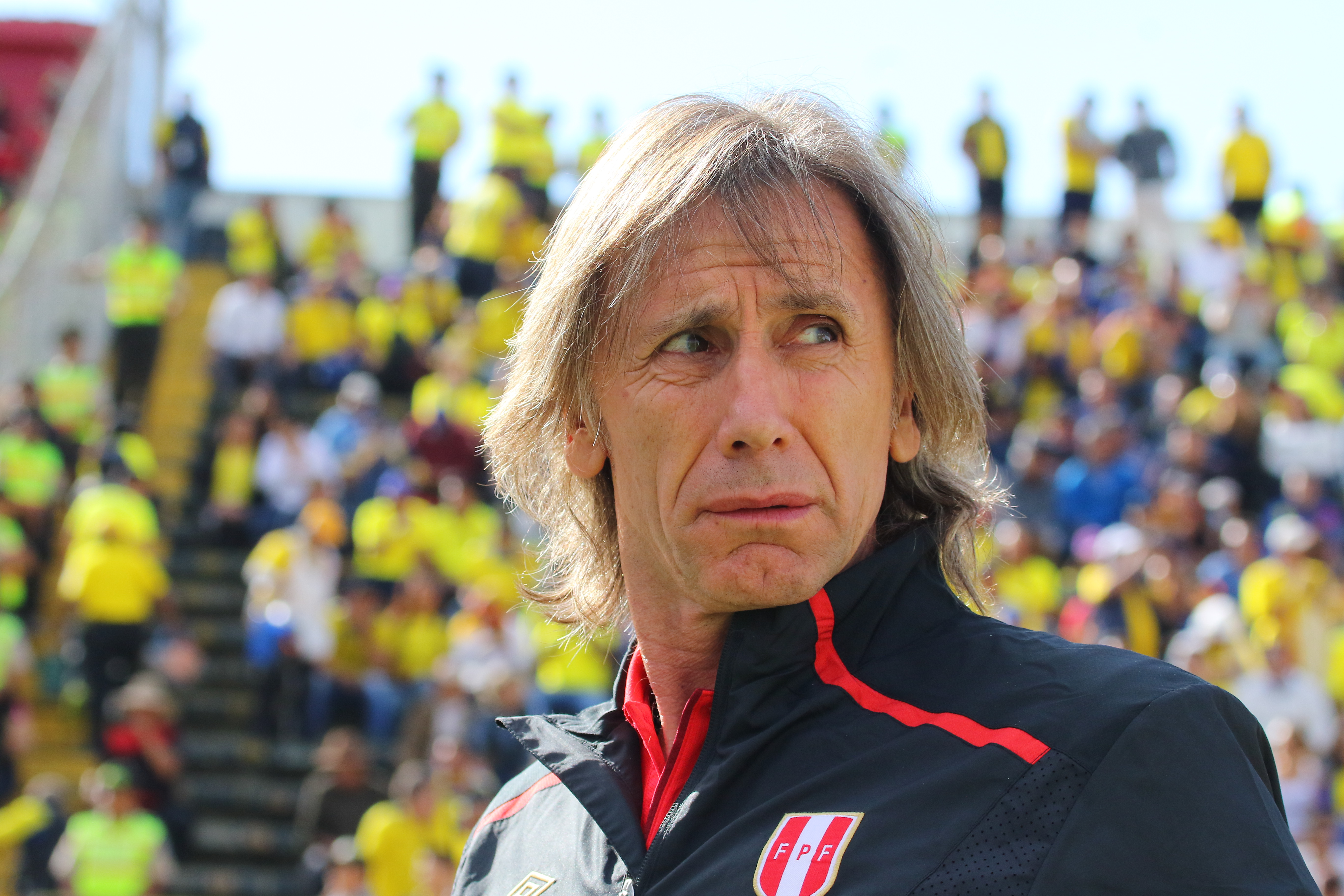 Quito 5 Sep (Andes).- Encuentro por eliminatorias Rusia 2018 entre Ecuador y Perú. Fotografías: Carlos Rodríguez/Andes.